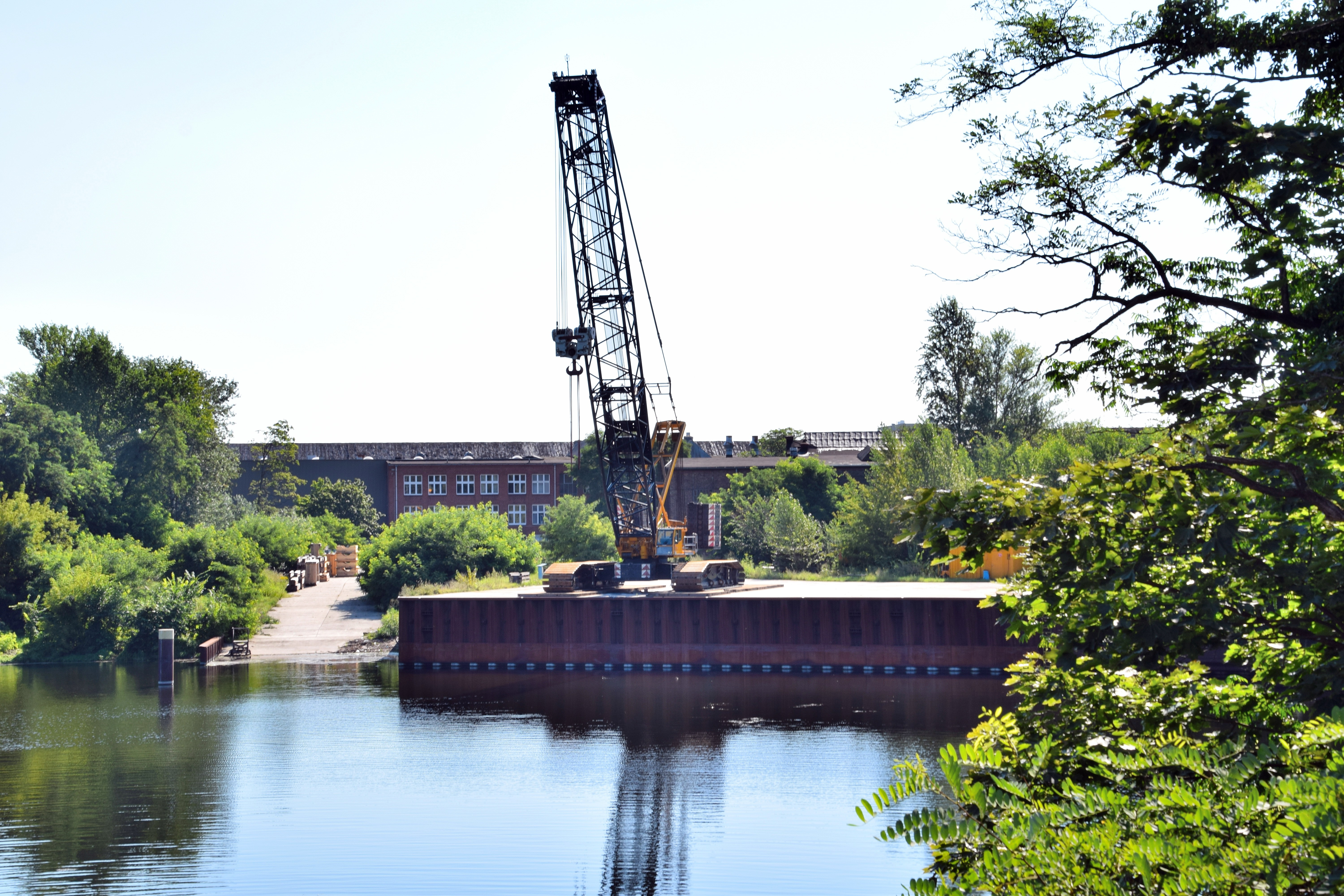 Der Borsig-Binnenhafen am hinteren Bereich des Borsig-Werksgeländes (Foto: Aug. 2017). Seit ca. 1970 nicht mehr genutzt, wurde der Hafen jetzt mit neuer Kaimauer bis 2009 wieder ausgebaut und dann reaktiviert. Der Borsighafen erhielt eine Auffahrrampe, eine sogenannte Roll-on/Roll-off Anlage (Ro/Ro Anlage) zum direkten Befahren vom Borsig Werksgelände mit Schwerlasttransporter an das Transport-Binnenschiff.